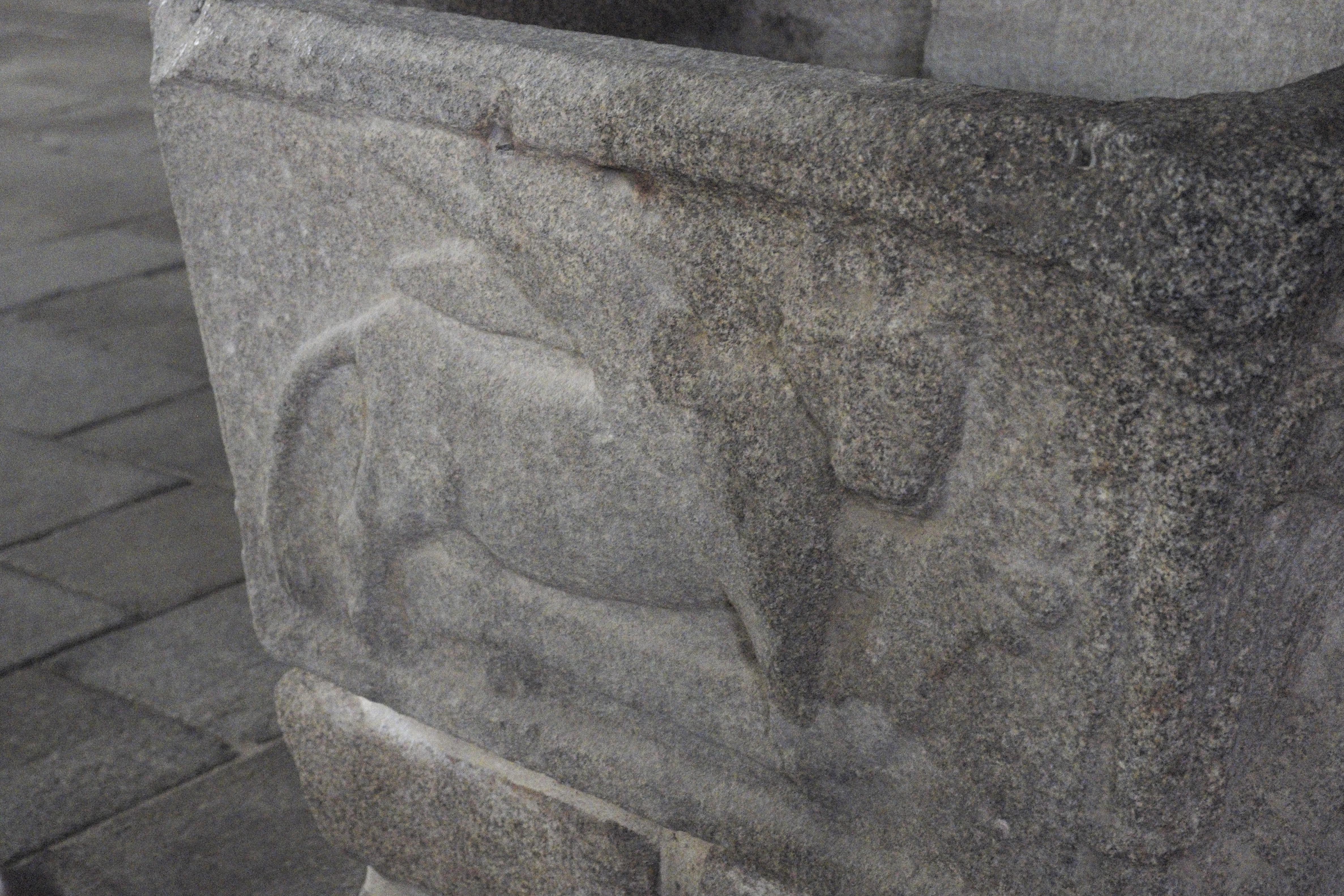 Katholische Pfarrkirche Saint-Pierre-Saint-Paul in Bazouges-la-Pérouse im Département Ille-et-Vilaine (Region Bretagne/Frankreich), Taufbecken aus dem 15. Jahrhundert, an den Seiten Reliefs der Evangelistensymbole